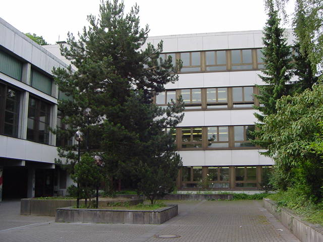 Bild der Schule